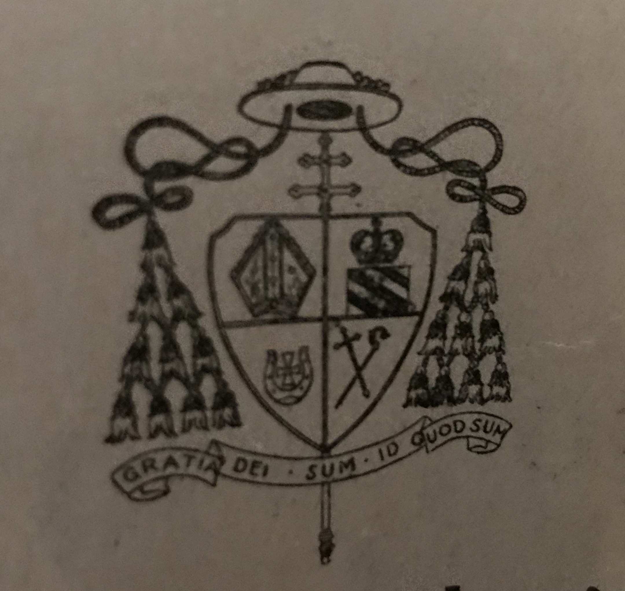 Herb Arcybiskupa Nowowiejskiego